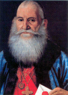 Прота Матеја Ненадовић, слика из 1841. рад Георгија Бакаловића (1786-1843) Licensing Template:Јв-уметност